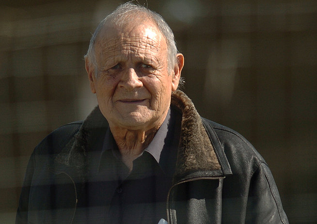 Néstor Goncalves